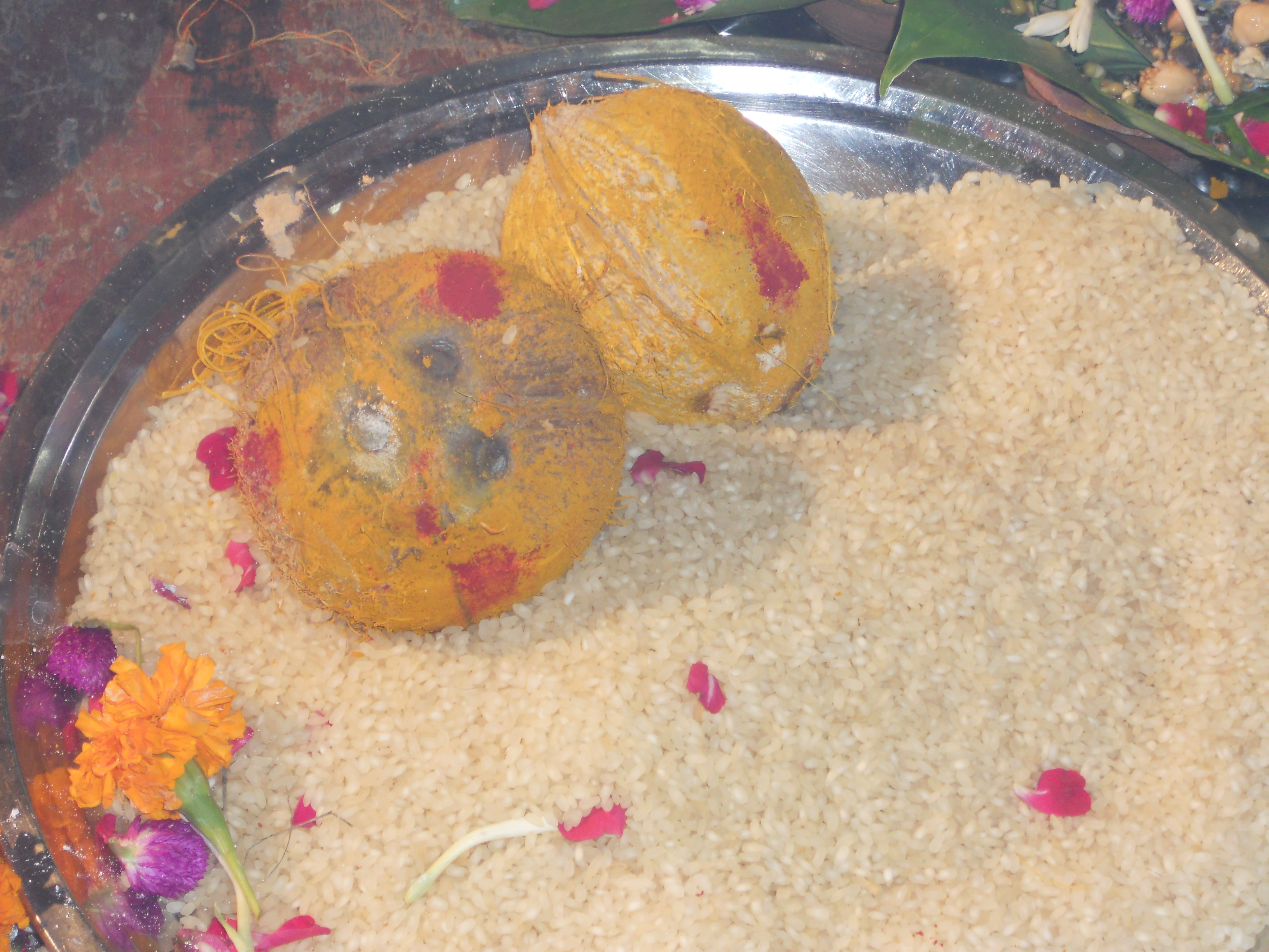 தேங்காய்த் தட்டம்